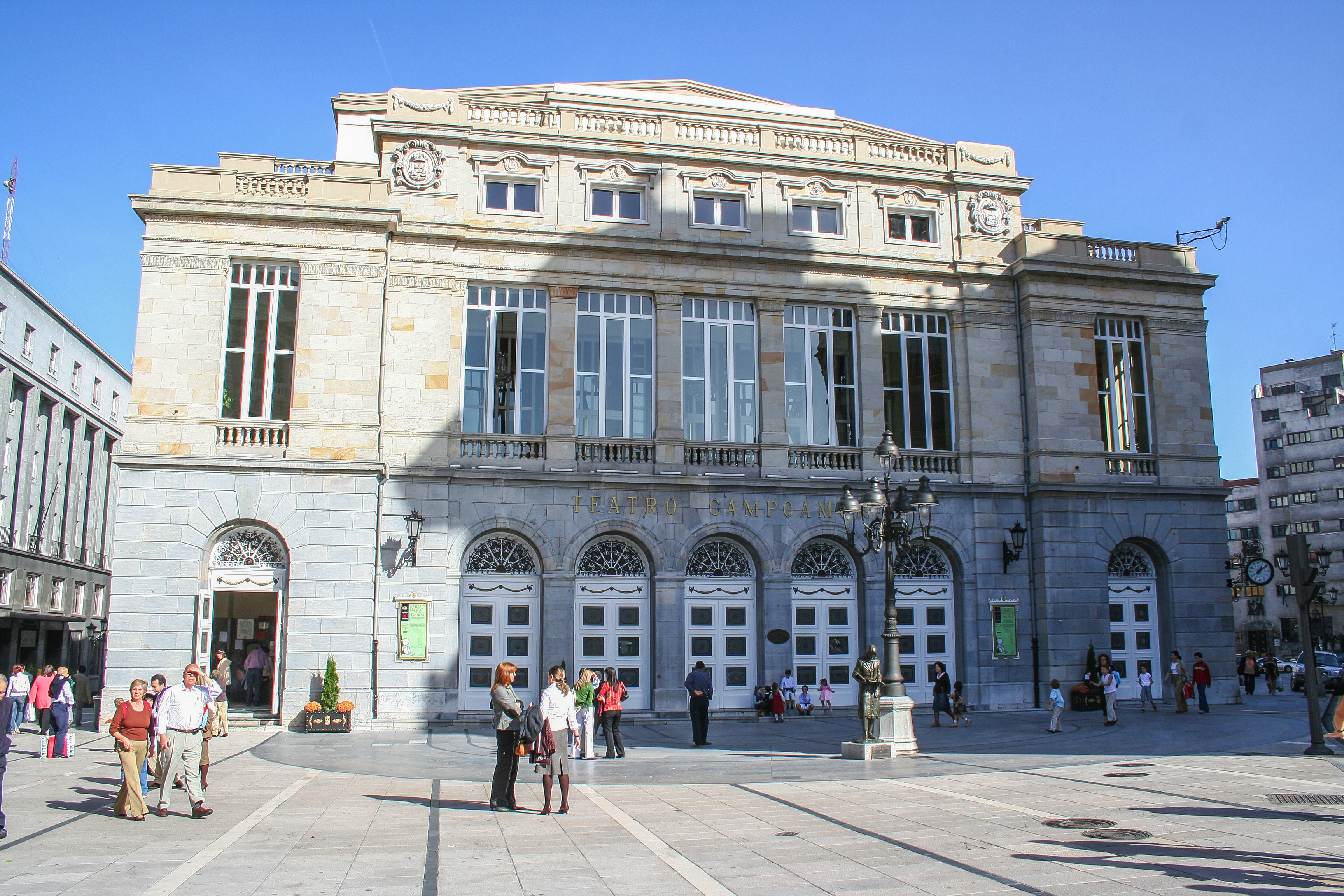 Fachada principal del Teatro Campoamor de Oviedo, España.